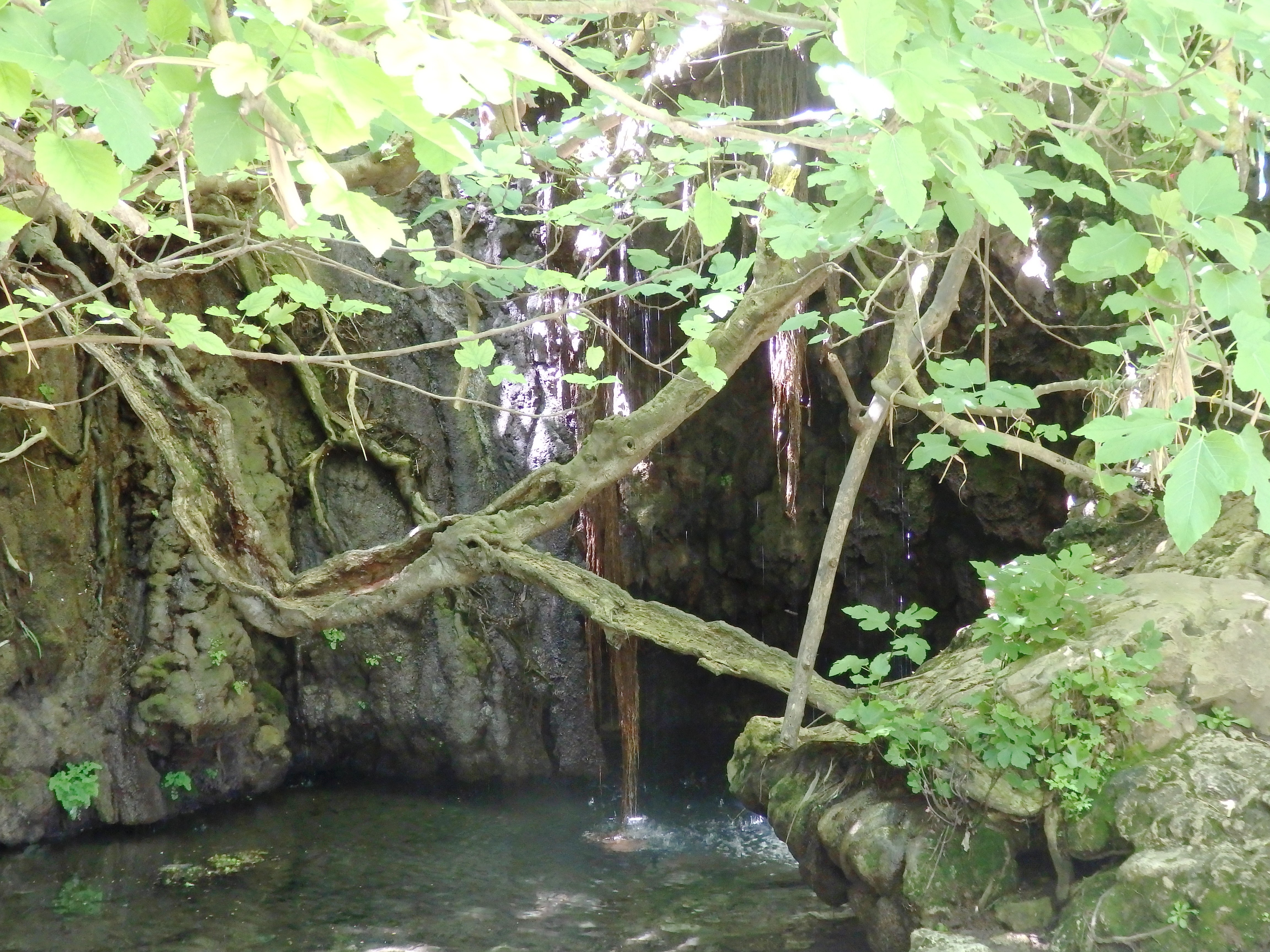 Bad der Aphodite, Akamashalbinsel, Zypern